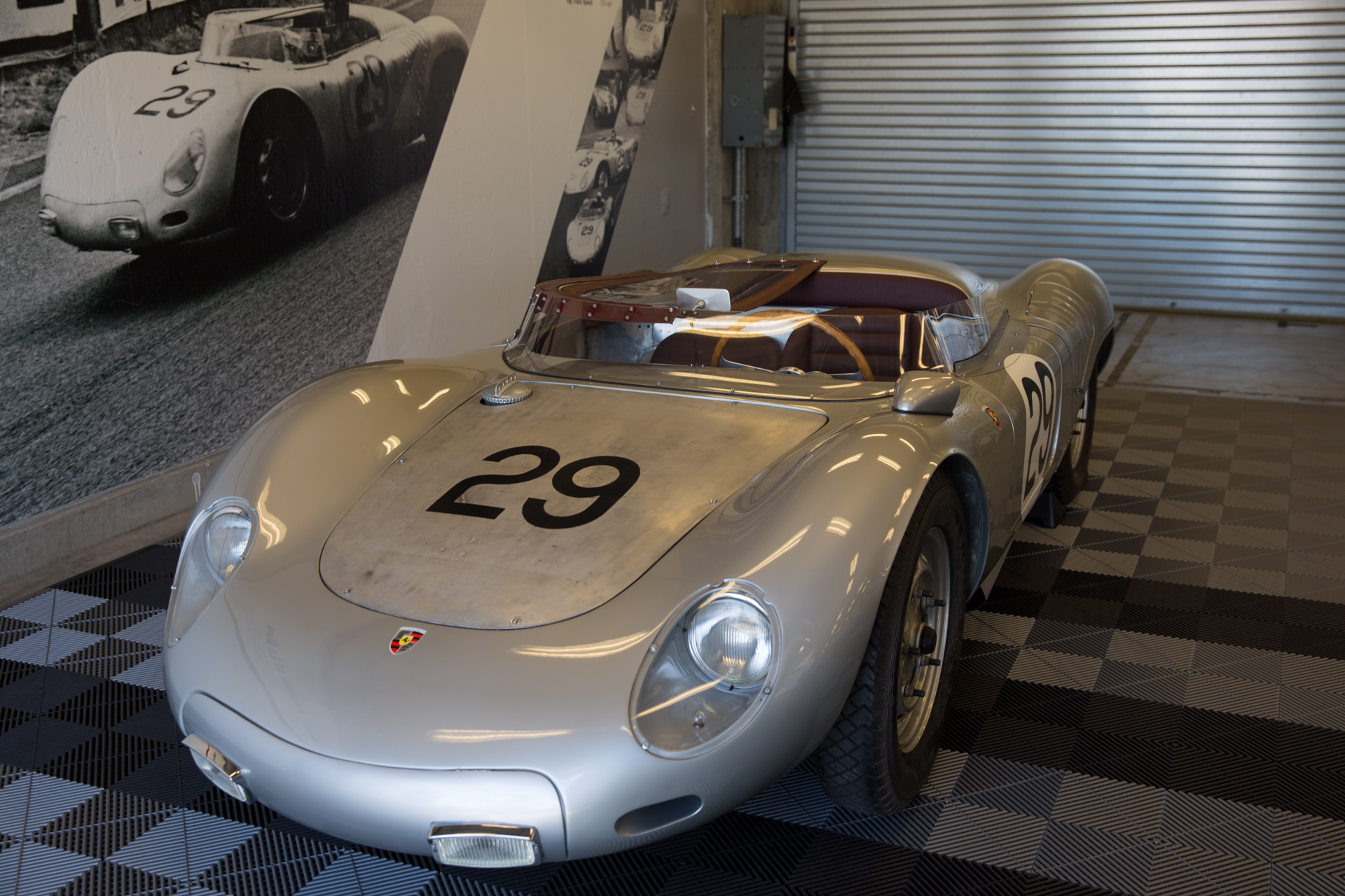 Rennsport Reunion V